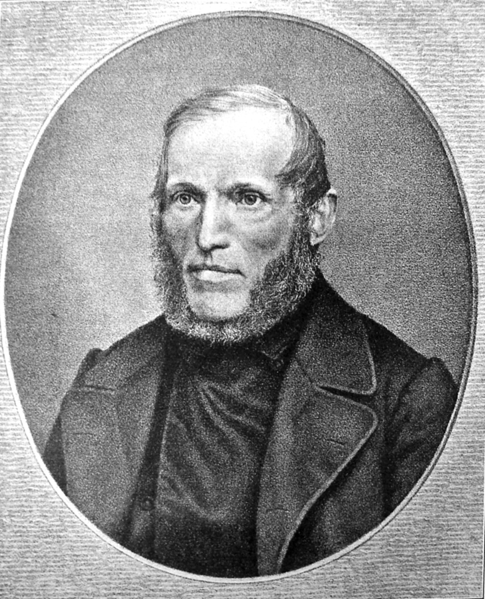 Christen Kold (født 29. marts 1816, død 6. april 1870) var en dansk lærer, der var en pioner indenfor højskole- og friskolebevægelsen (Lithographie).